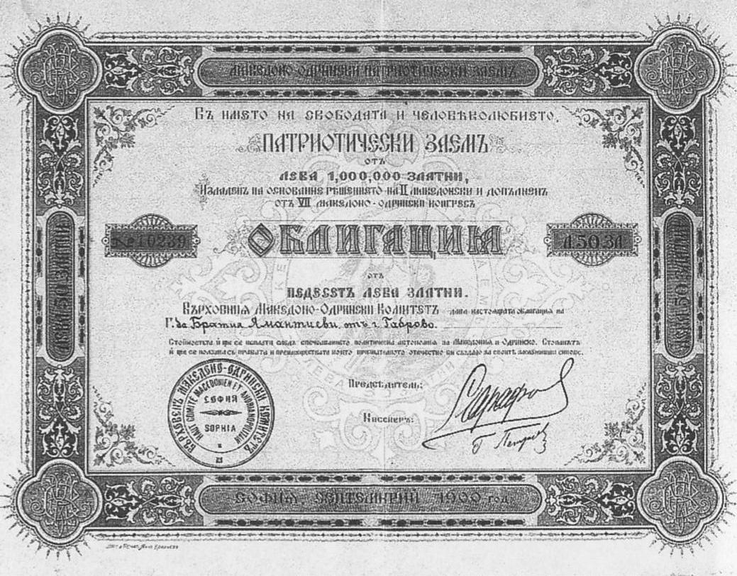 Облигация на ВМОК с подписа на Борис Сарафов.